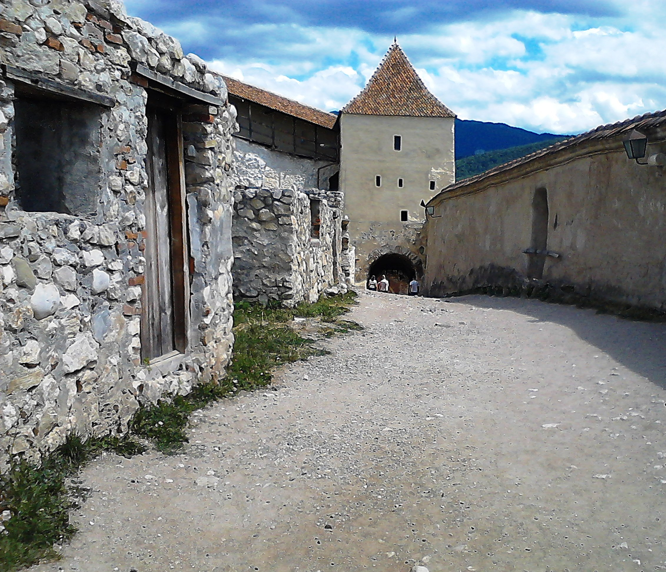 Situl arheologic de la Râșnov